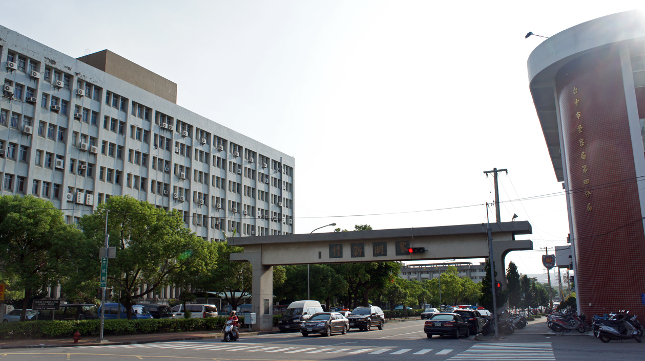 行政院中部聯合服務中心位於臺中市黎明新村。